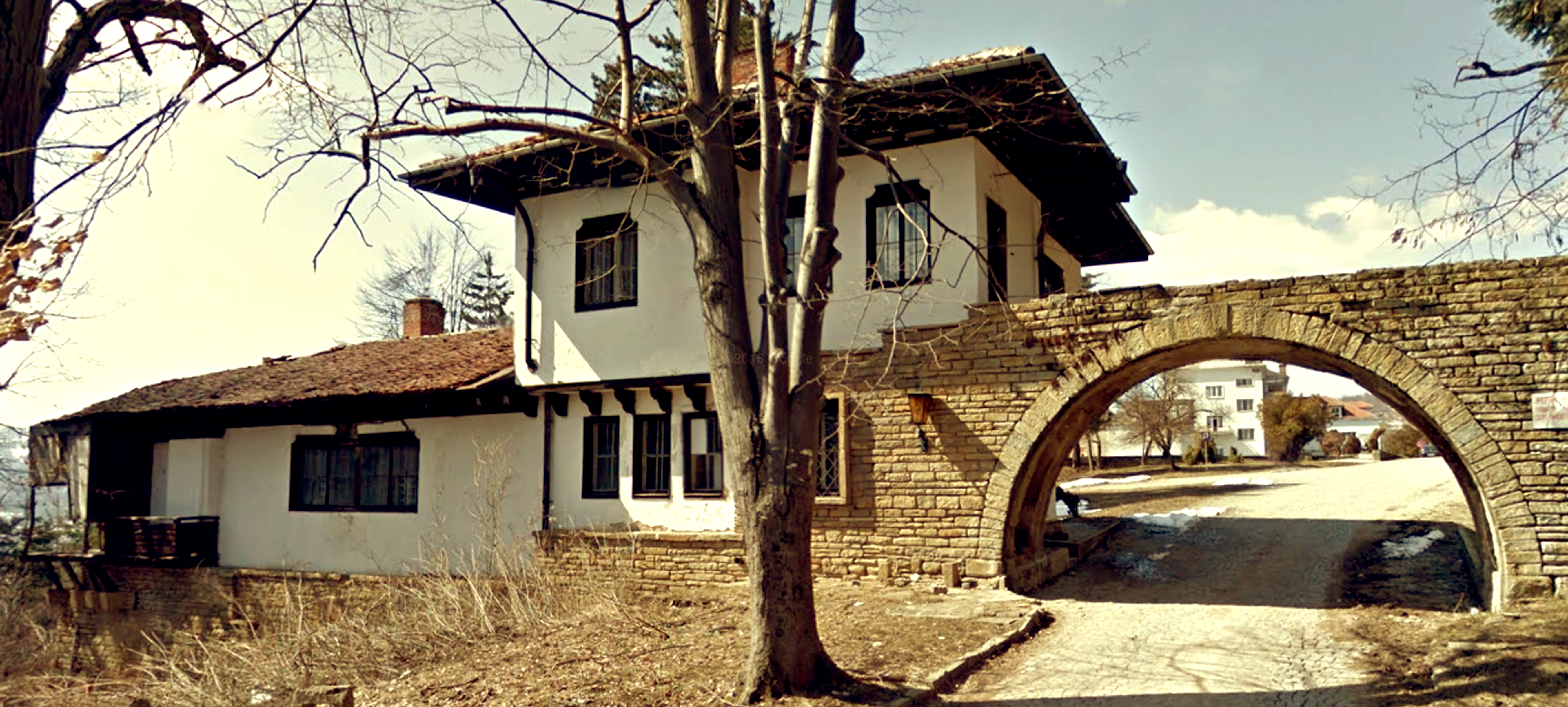 Царски детски санаториум Трявна